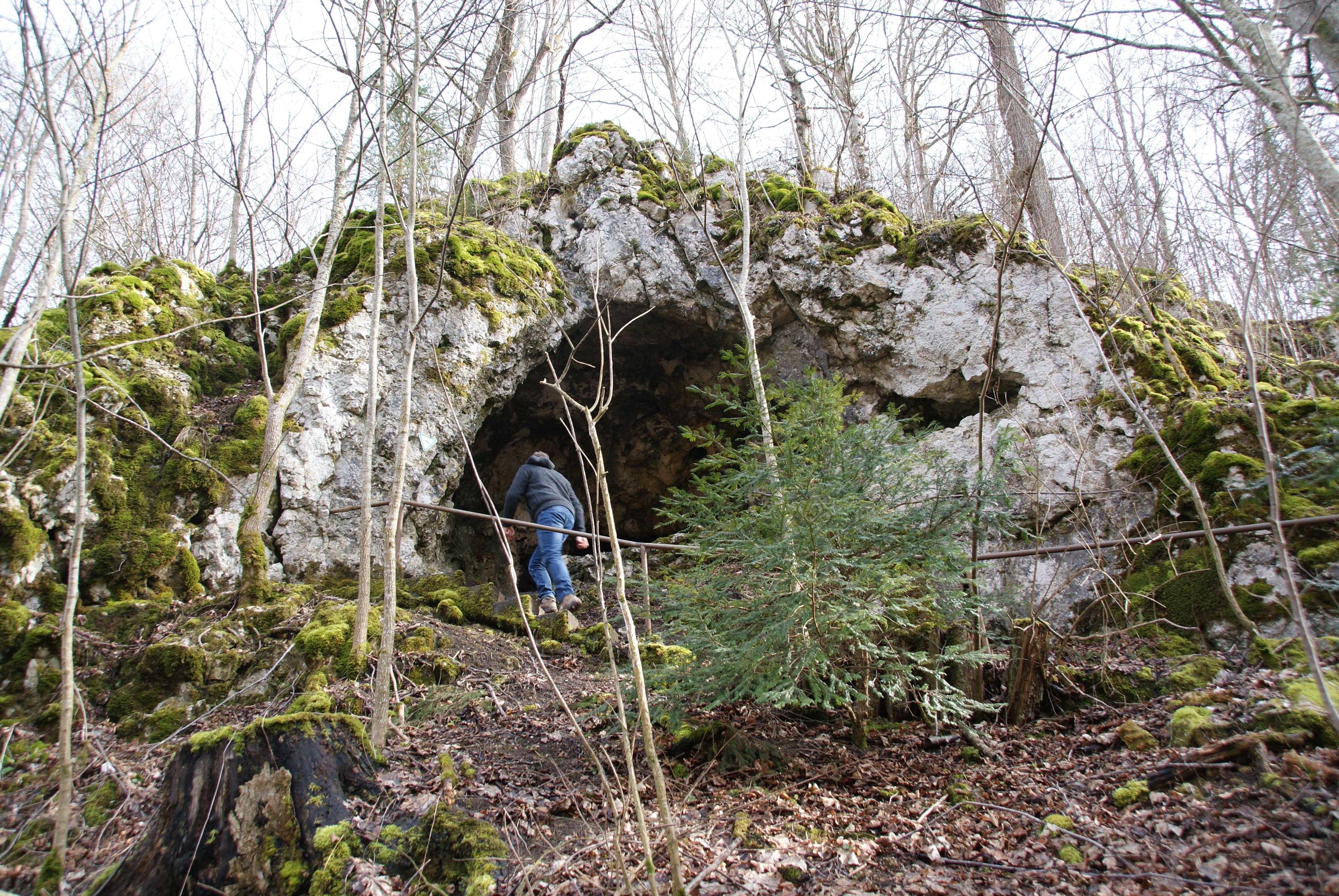 Käthra Kuche (Halbhöhle, Felsschutzdach) bei Briel (Ehingen (Donau)).